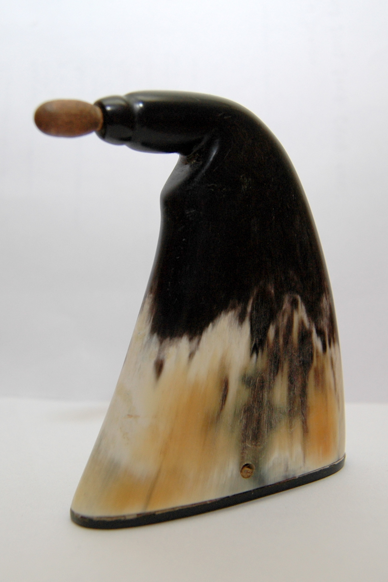 Współczesny Rożek Kaszubski przeznaczony do przechowywania tabaki, wykonany z krowiego rogu.